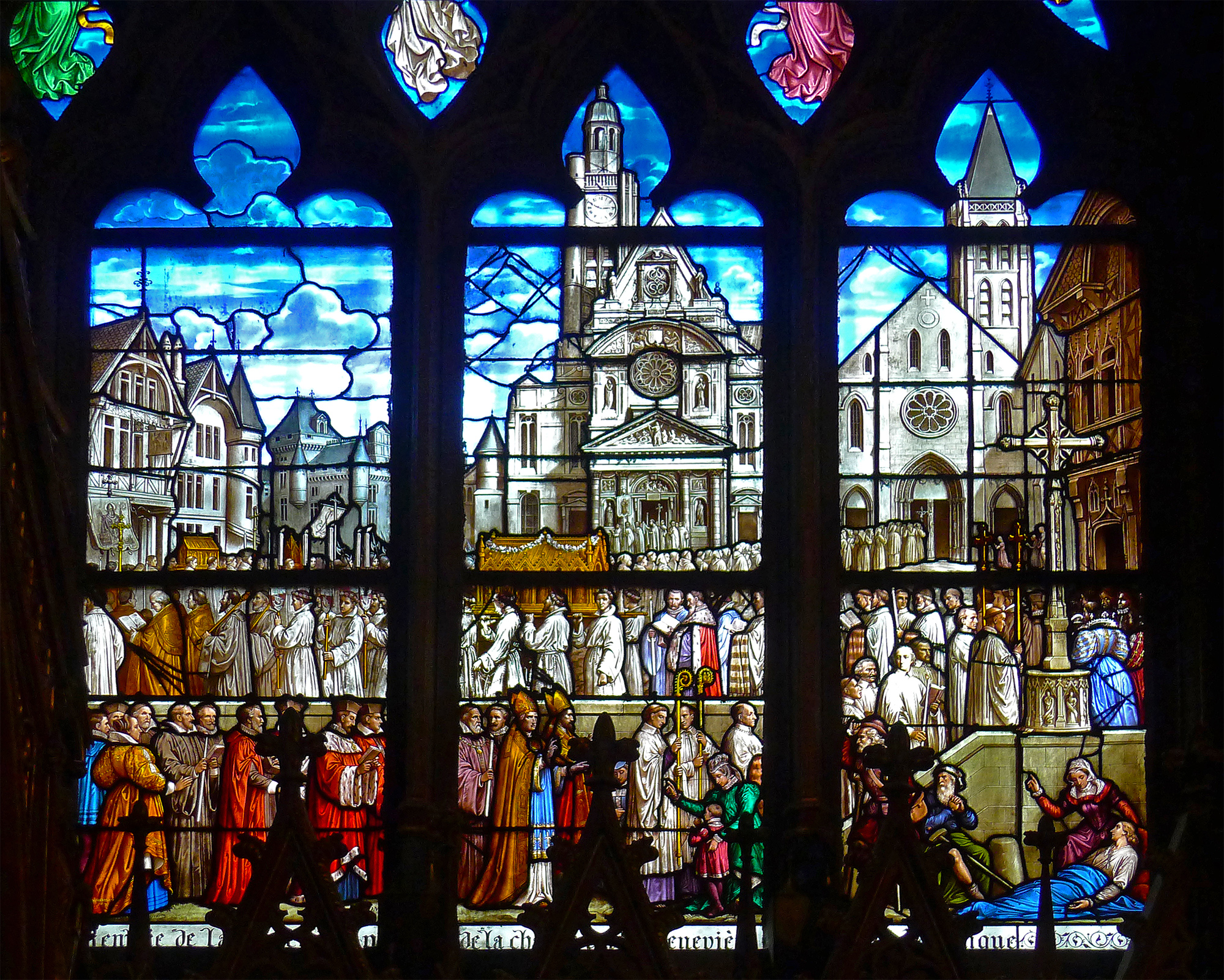 Église Saint-Étienne-du-Mont (vitrail) - Paris V Procession solennelle de la châsse de sainte Geneviève au départ de l'église Saint-Étienne-du-Mont et de l'église Sainte-Geneviève (œuvre de E.Didron, 1882)